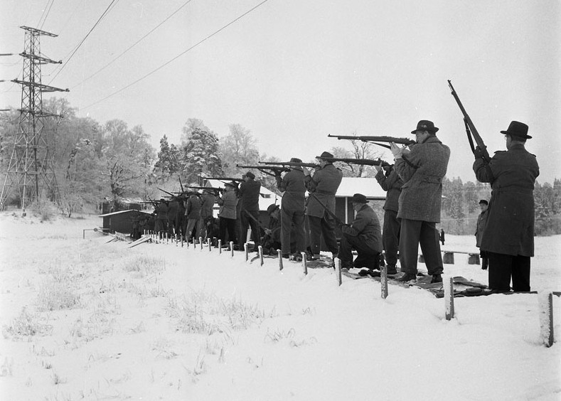 Stora skuggans skjutbana. Skarpskyttar hälsar enligt tradition det nya året välkommet med svensk huvudskjutning. 1953-1953FOTOGRAF: Ryman, Sture (Pressfotograf). Svenska DagbladetBILDNUMMER: SvD 33766Stadsmuseet i Stockholm